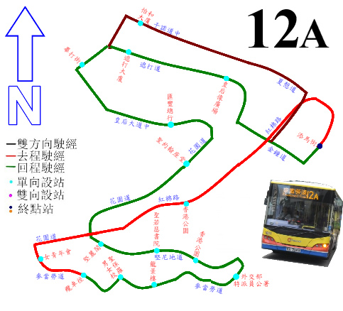 中文（香港）: 城巴12A線的走線圖